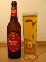 Reissdorf Kölsch d'un soir d'été. Hélas dans un verre à Schwarzbier. Auteur : Régis Lachaume Buveur : voir « Auteur »